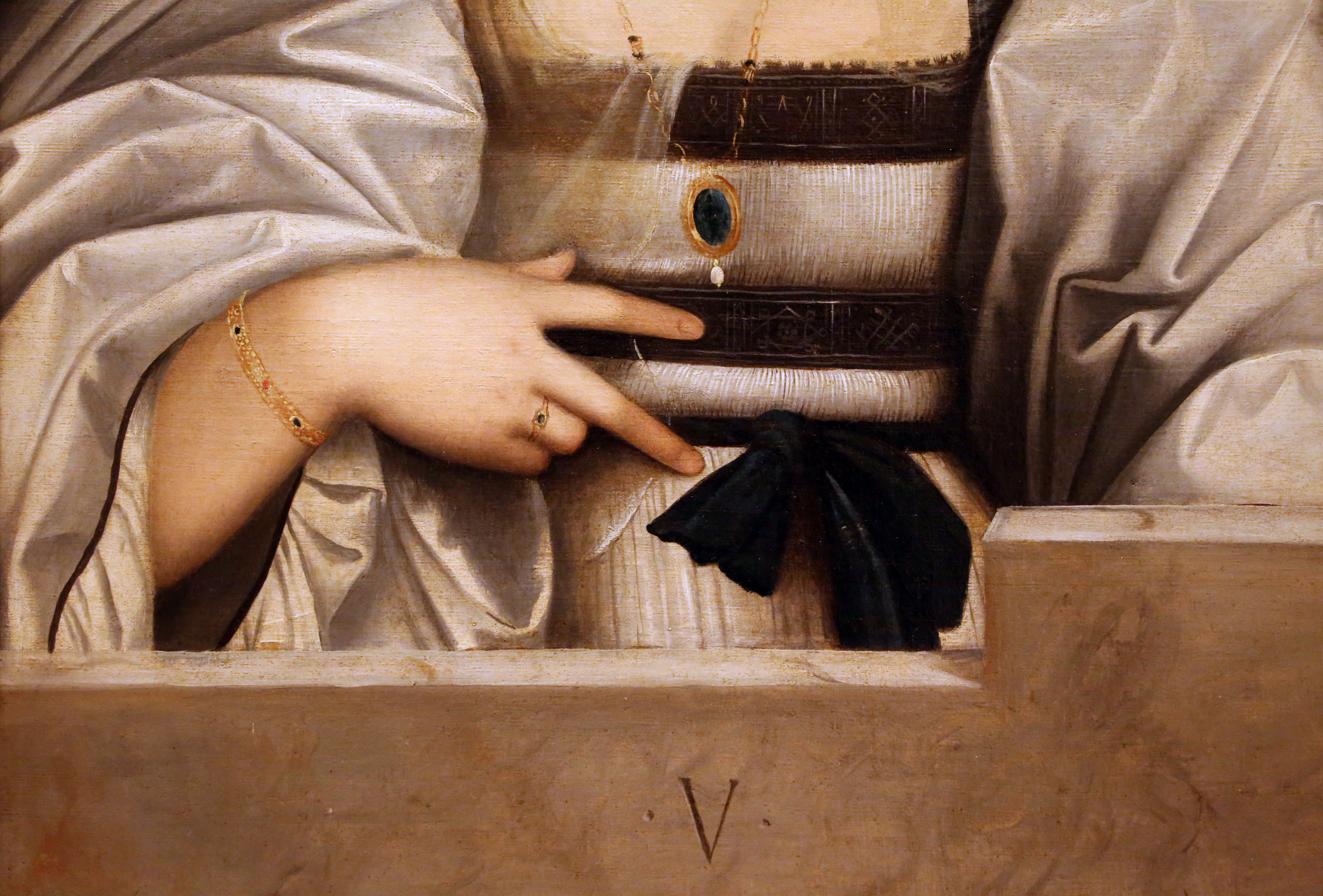 Palazzo dei Musei (Modena) This is a photo of a monument which is part of cultural heritage of Italy.